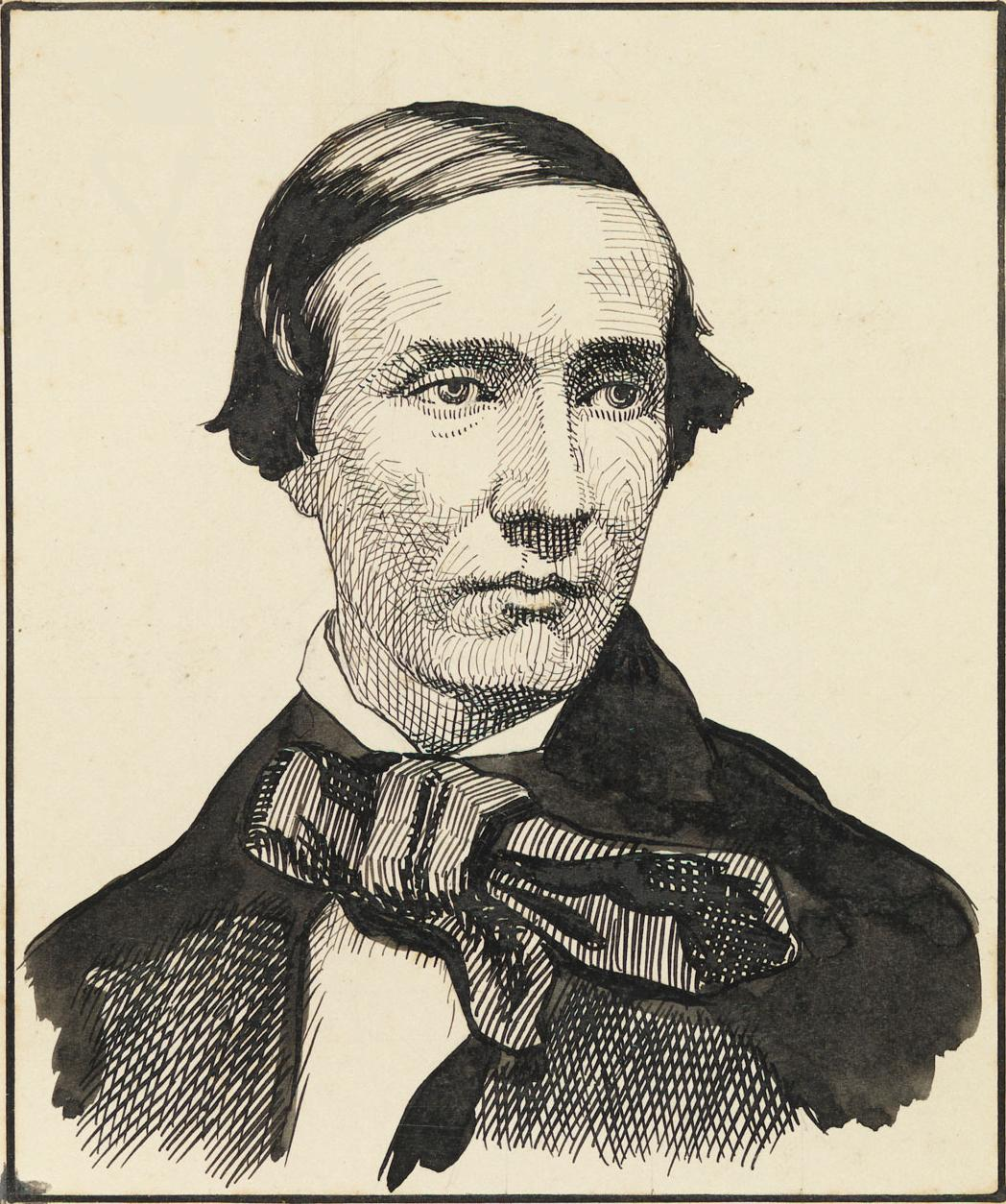 Souza Andrade